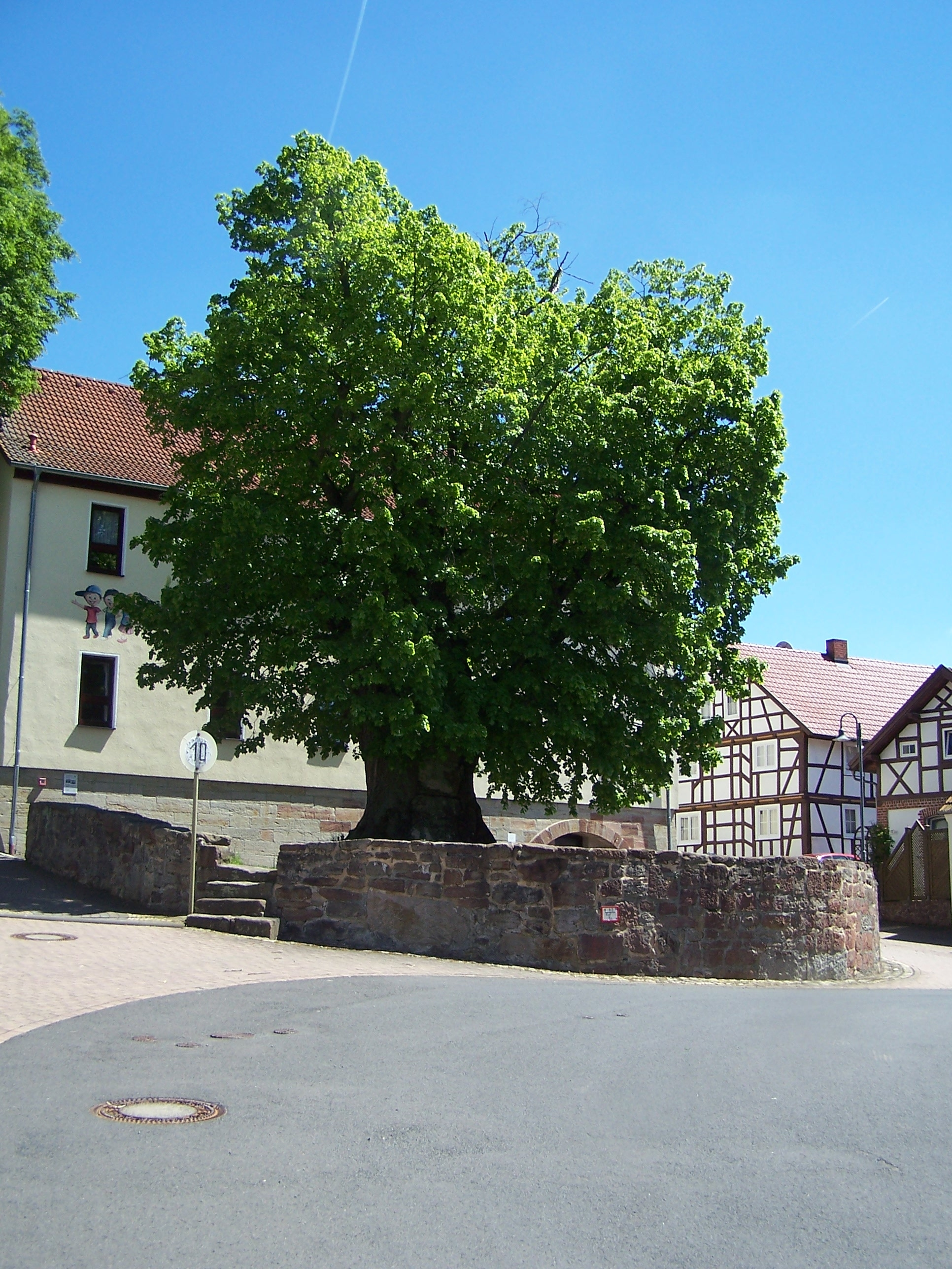 Der Anger mit Lindenbaum in Oechsen.